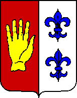 Familiewapen